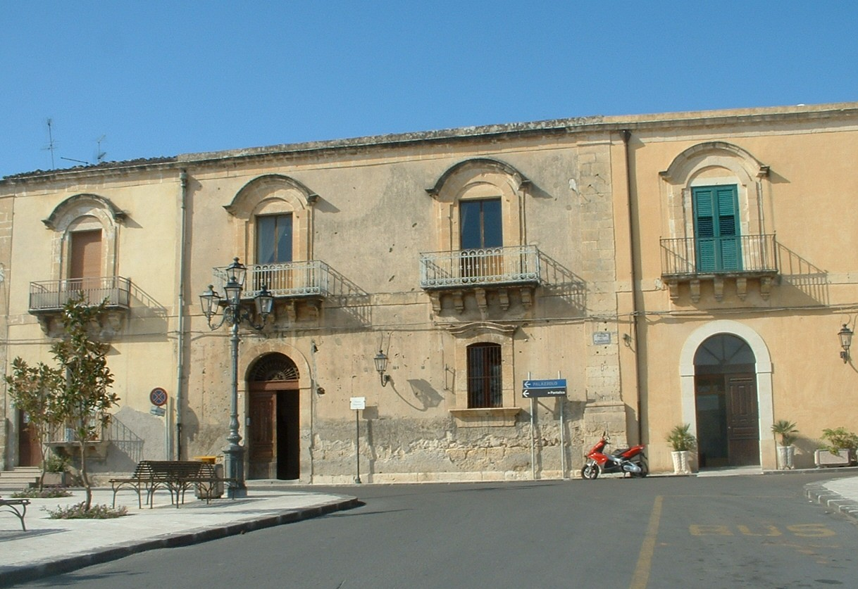 Solarino, Palazzo Requiesenz (XVIII sec.)